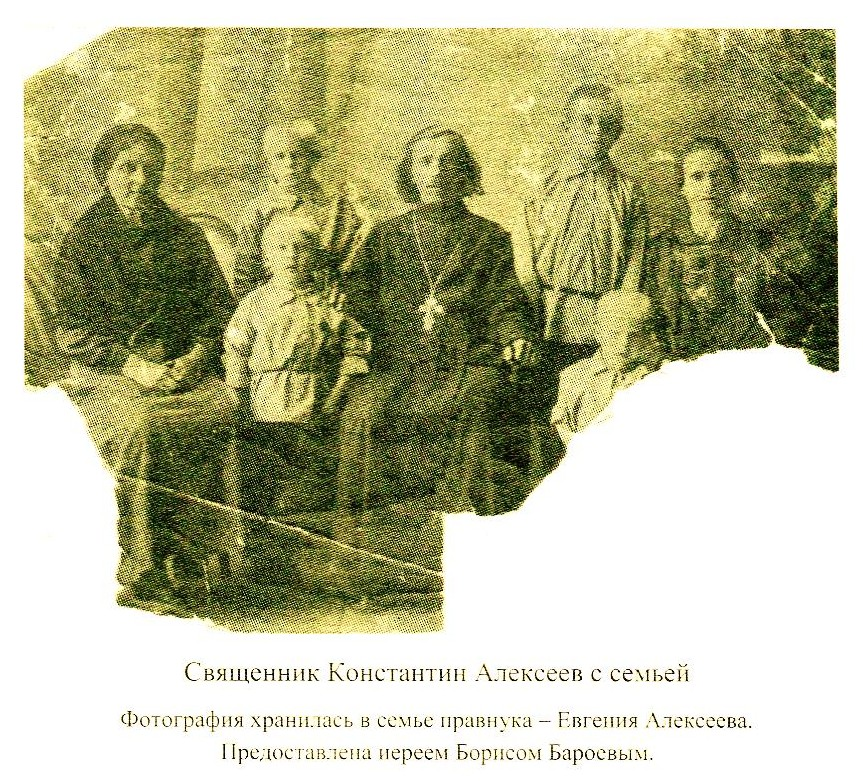 Фотография хранилась в семье правнука - Евгения Алексеева